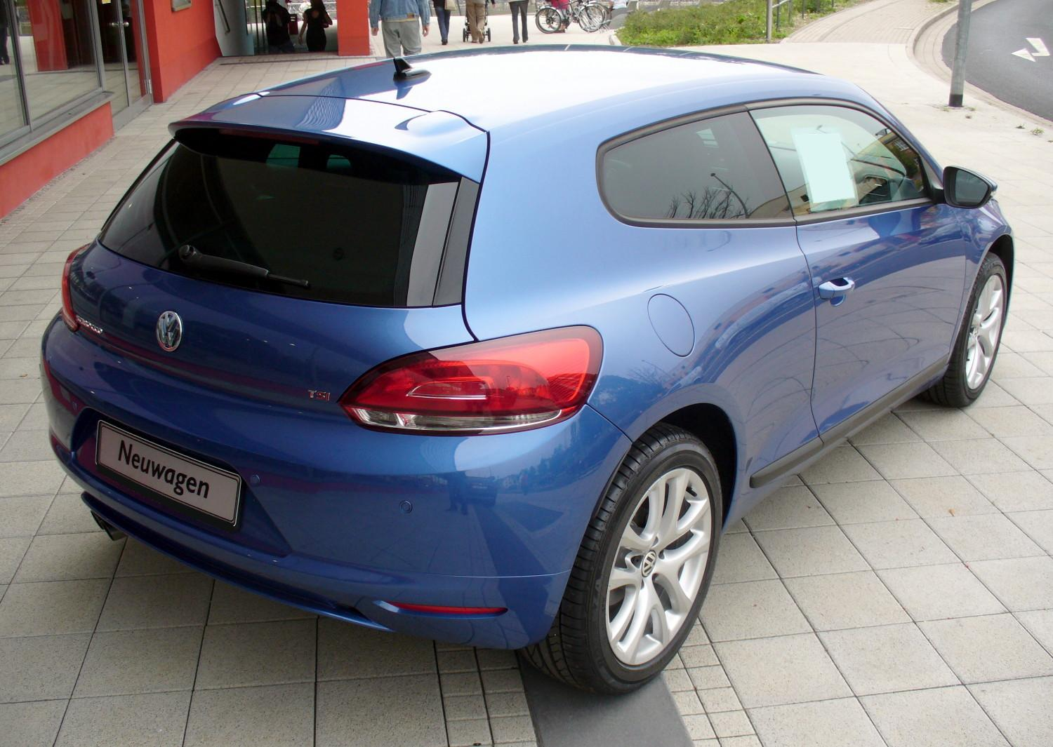 VW Scirocco III